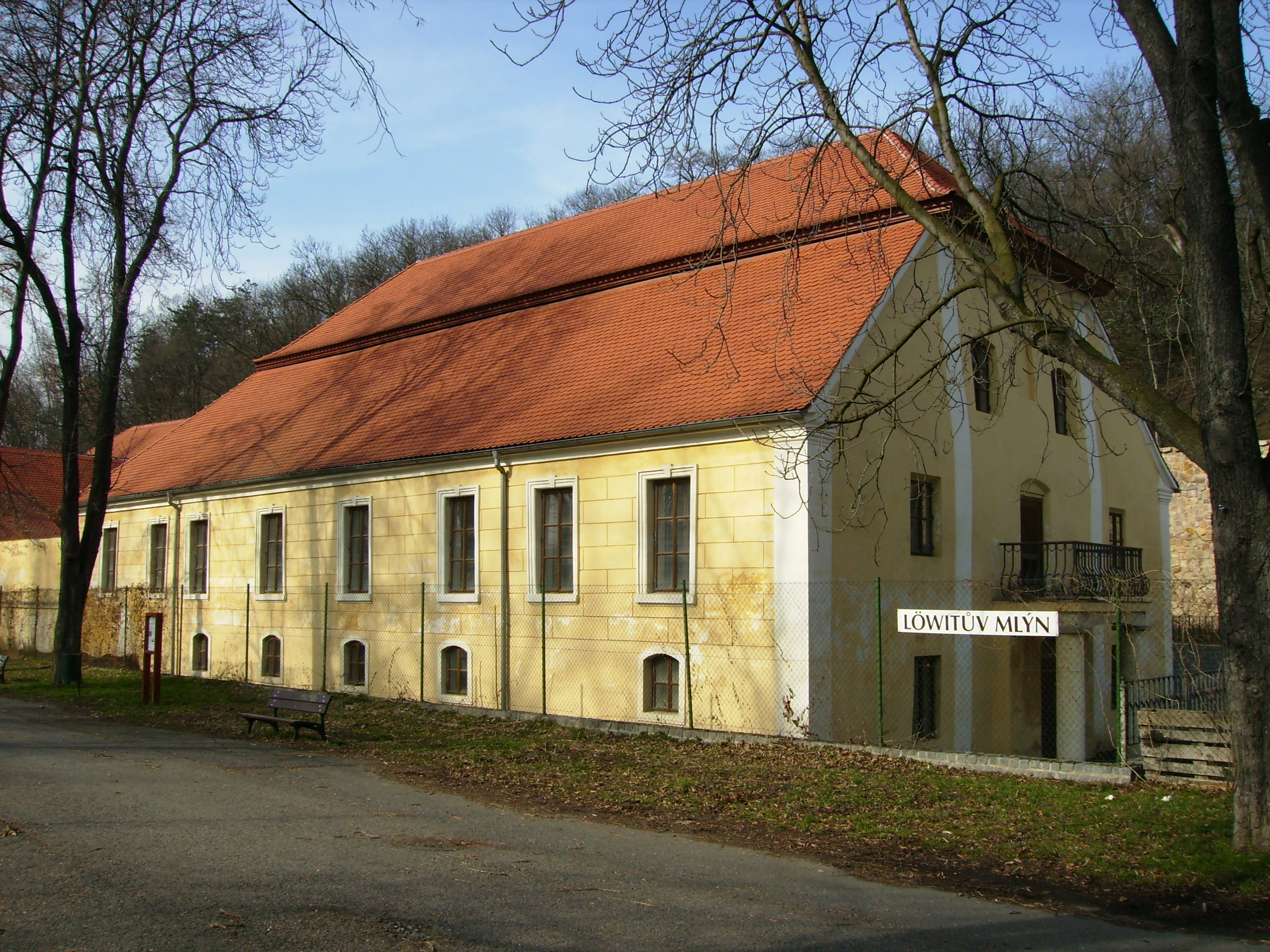 Löwitův mlýn v pražské Libni, ulice U Českých loděnic